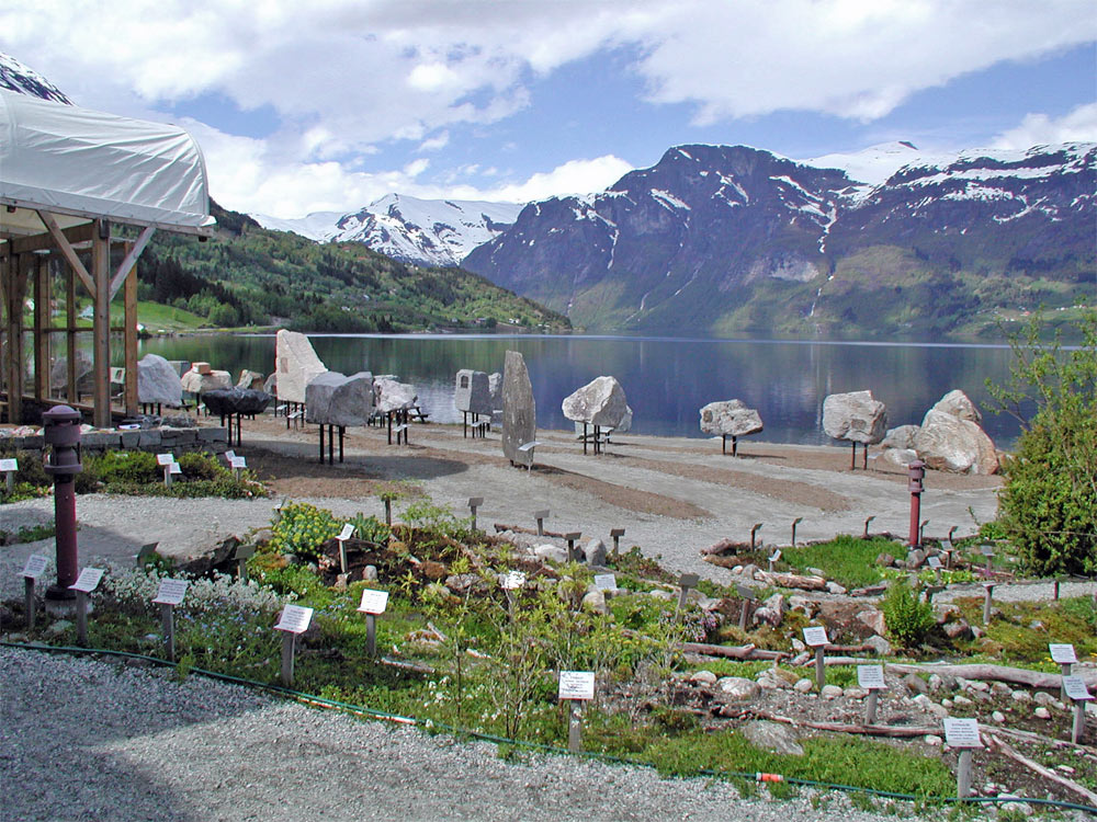 Botanischer Garten und Geologiepark des Jostedalsbreen Nasjonalparksenter